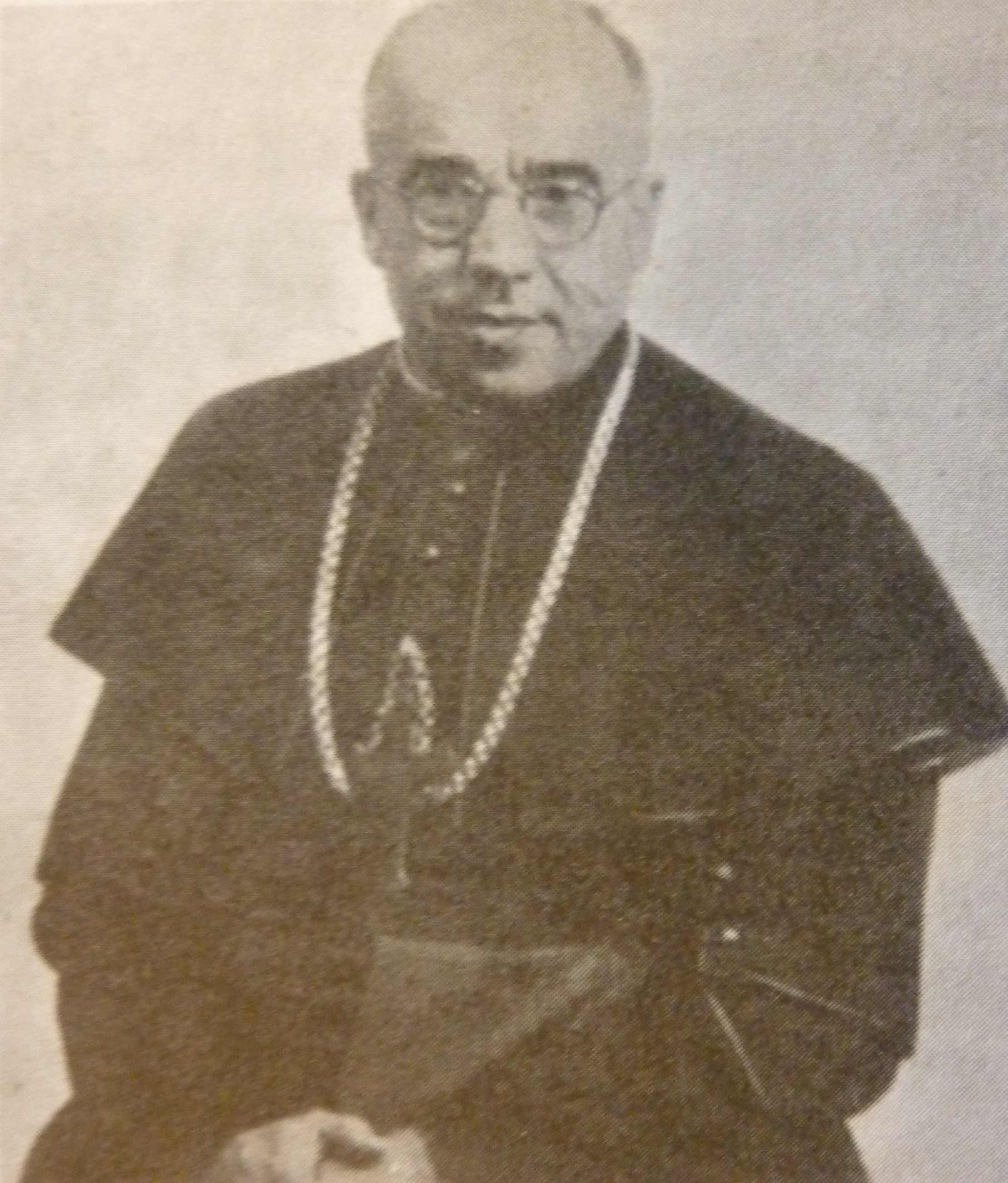 Ks. Edward Narbutt-Narbuttowicz